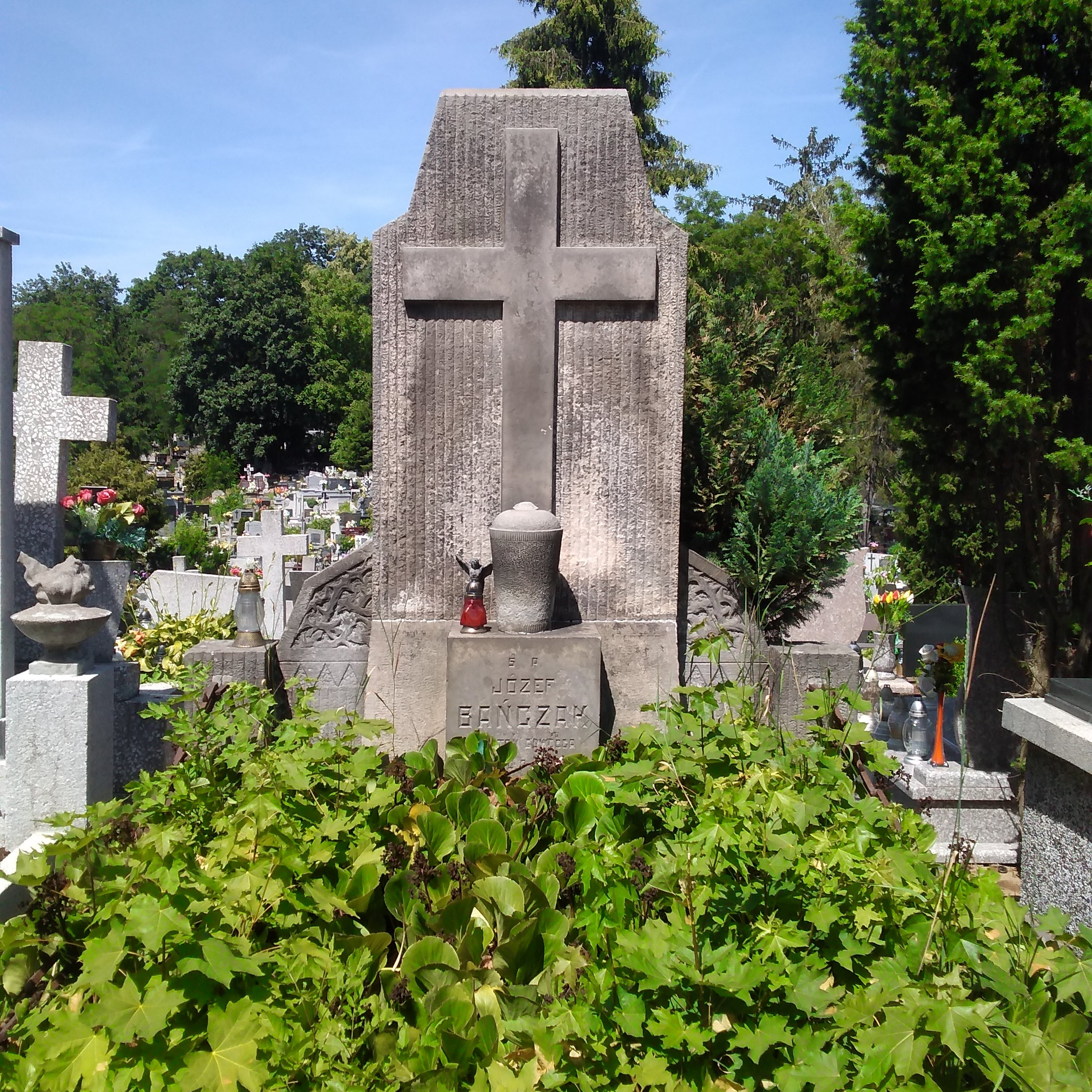 Grób kpt. Józefa Bańczaka, dowódcy kompanii granicznej KOP „Wiżajny” na przełomie lat 1935/36, na włocławskim cmentarzu komunalnym.